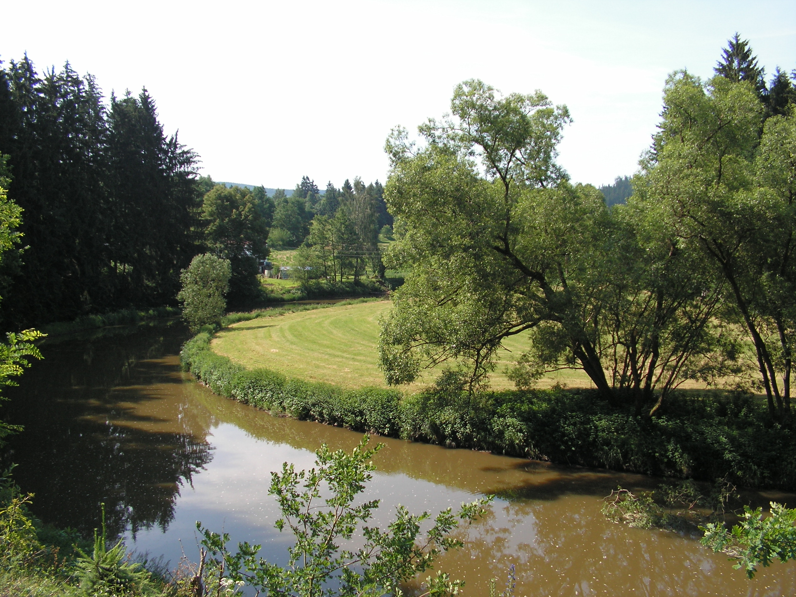 Sluneční zátoka na řece Sázavě u Vilémovic nedaleko Ledče nad Sázavou.